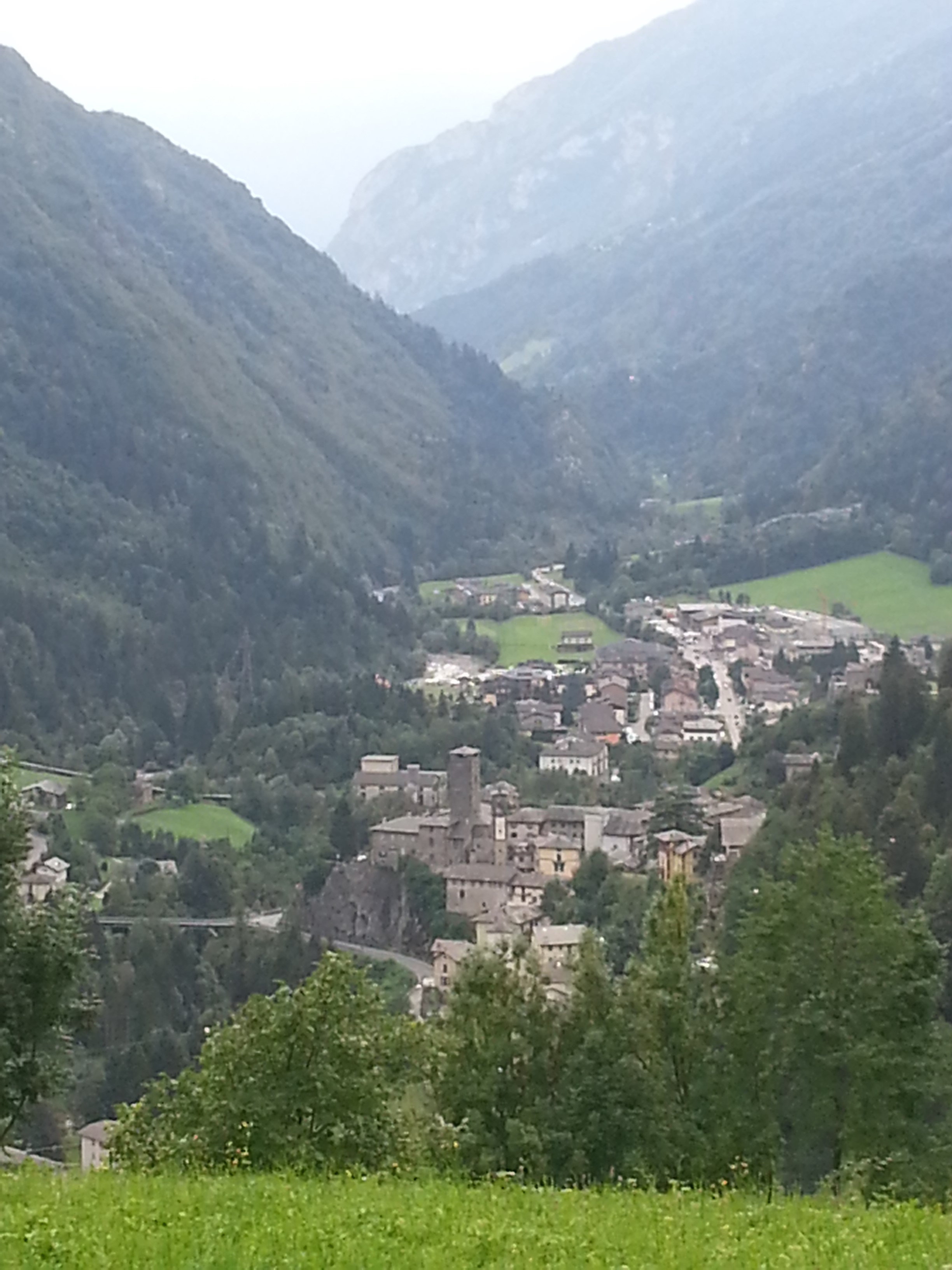 Gromo dalla Ripa bassa